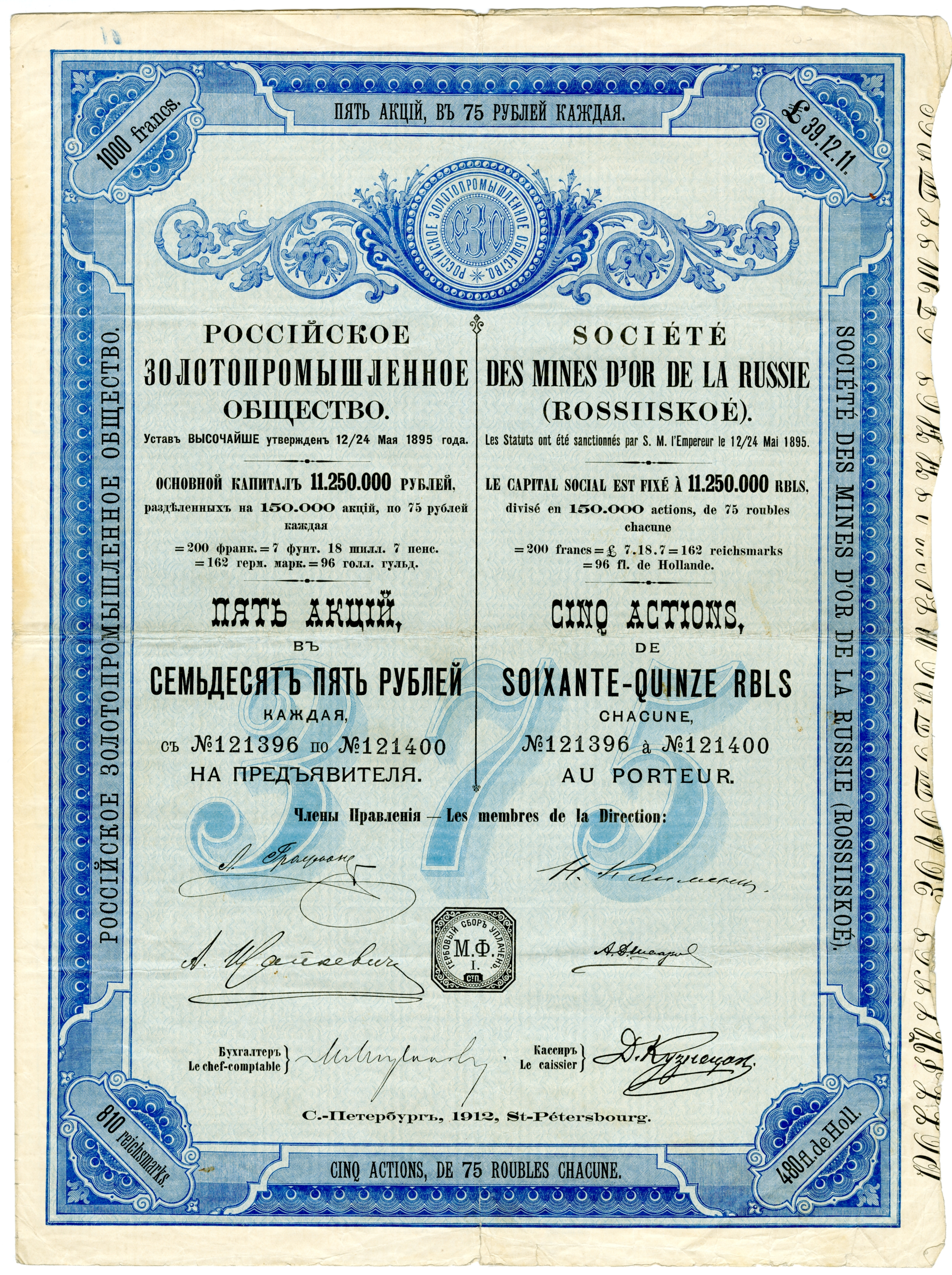 Пять акций на предъявителя в 75 рублей каждая Российского Золотопромышленного Общества